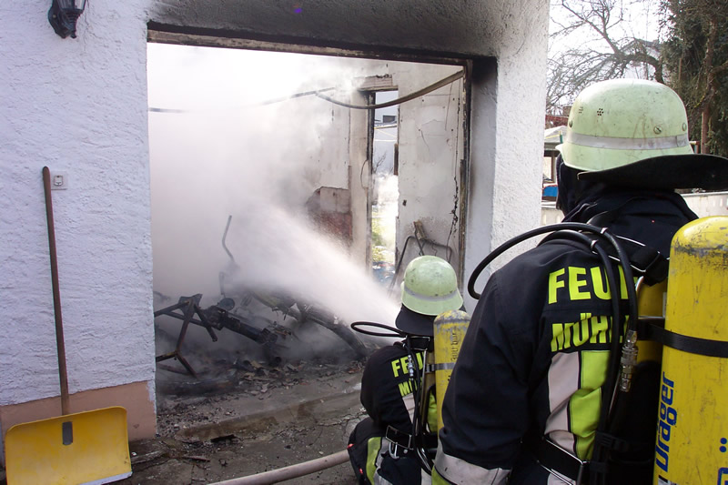 Feuerwehrmänner bei Nachlöscharbeiten nach einem Garagenbrand Sonstiges: Lizenzfrei